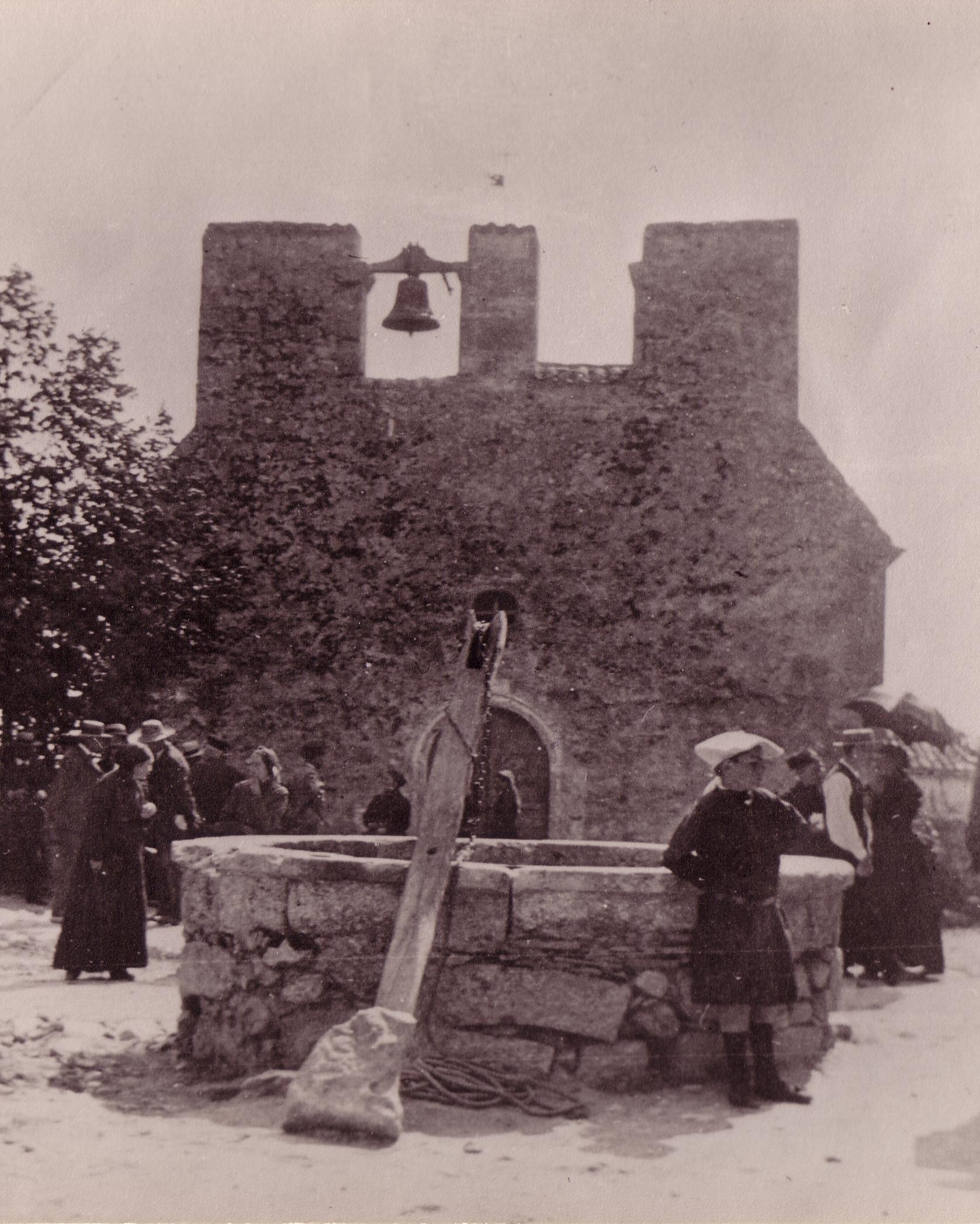 Ancienne église de Soumensac Date : avant 1900 Collection particulière